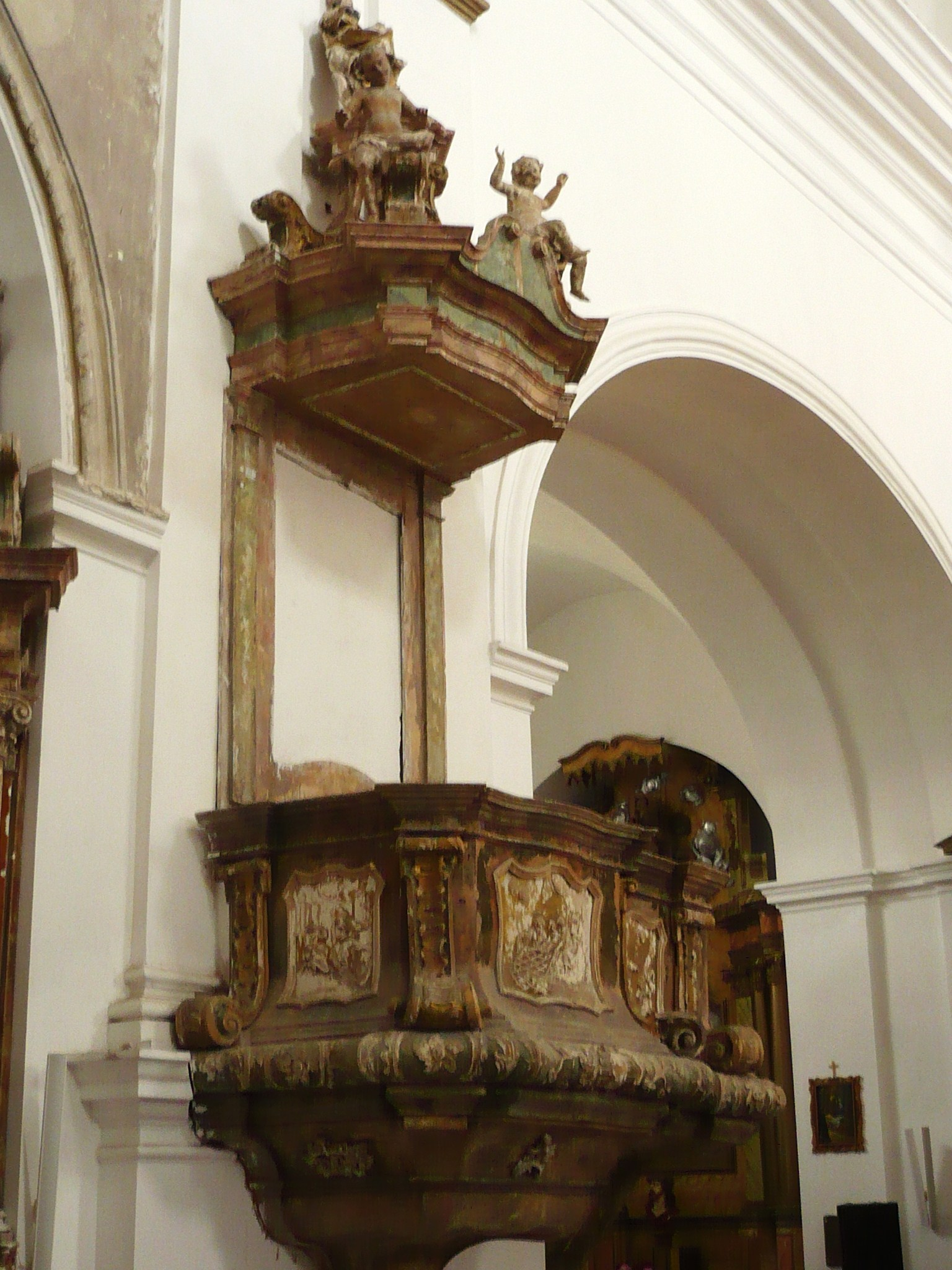 Zbaraż, kościół oo. bernardynów